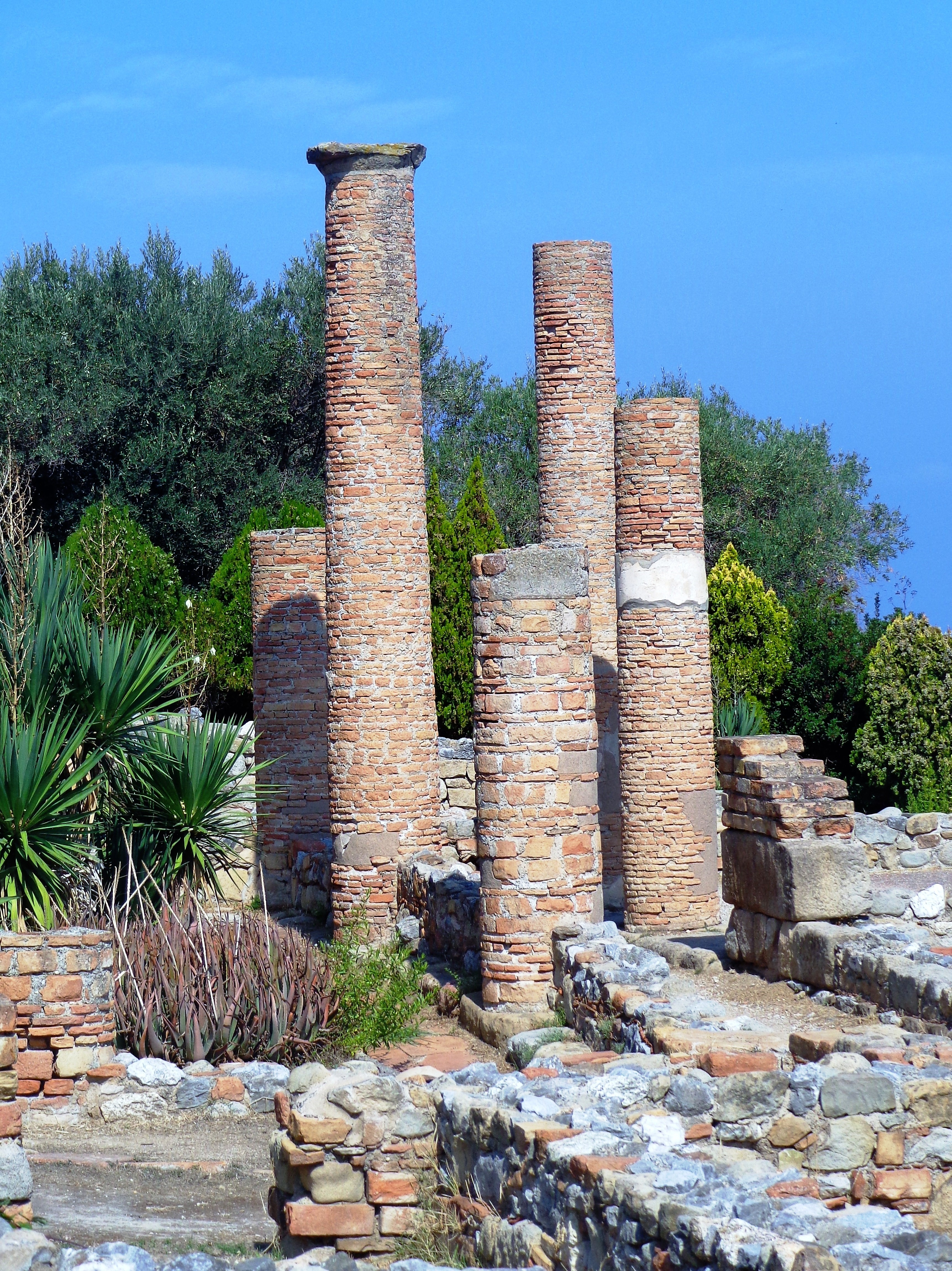 Peristilio - domus. 08 settembre 2012 (Escursione Tindari, Santuario e area archeologica). Scatto fotografico altresì presente negli album caricati sui profili personali di Facebook, Panoramio, Google, etc.